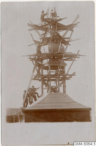 Montering av tornhuv på Nordhemsskolan 1915-16. Fotot ingår i fotosamling från Svenska Byggnadsarbetarförbundet, Avdelning 24 Göteborgs byggnadsträarbetare. Bildsamlingen vid Göteborgs stadsmuseum.